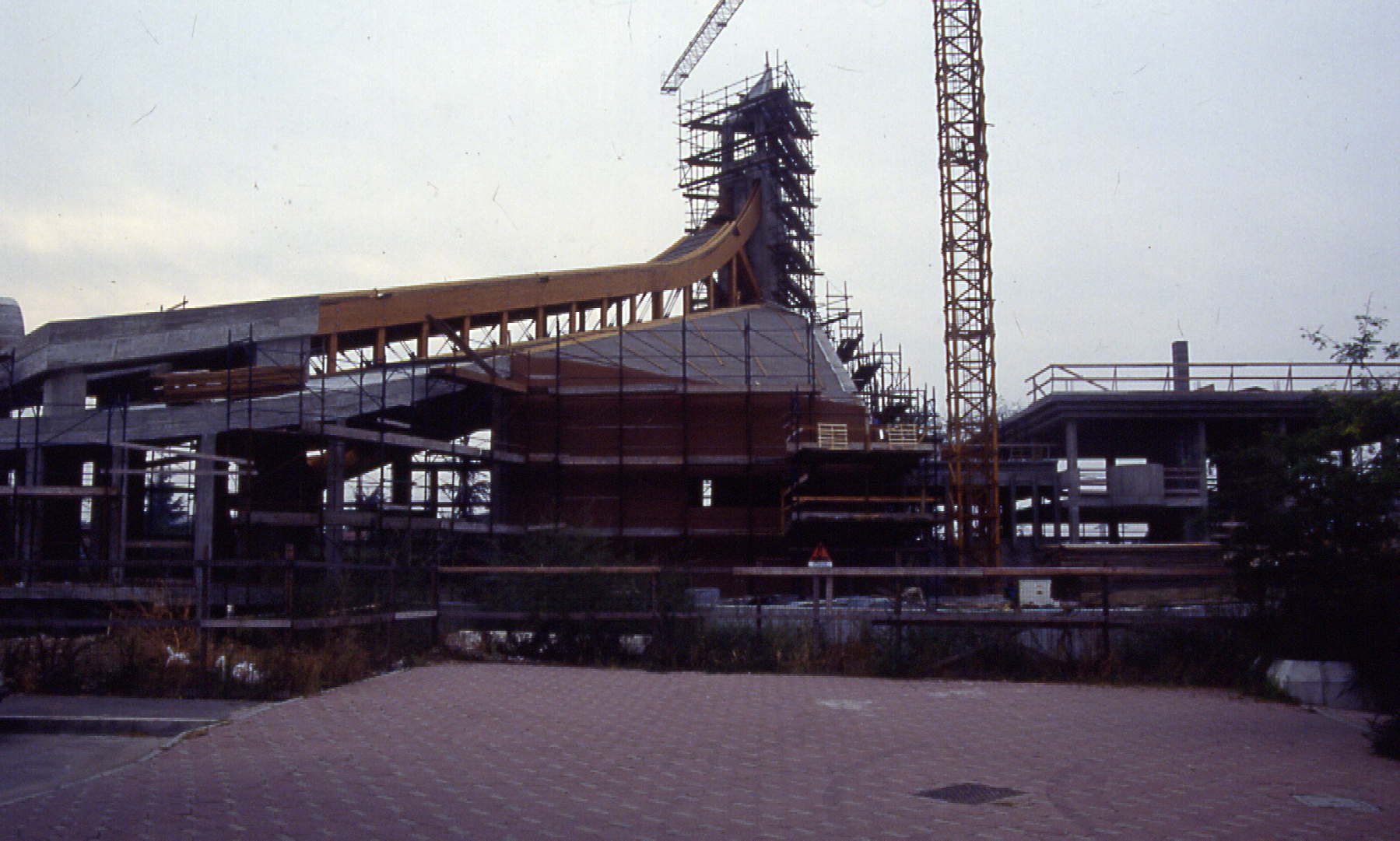 Stato avanzamento lavori a fine estate 1990